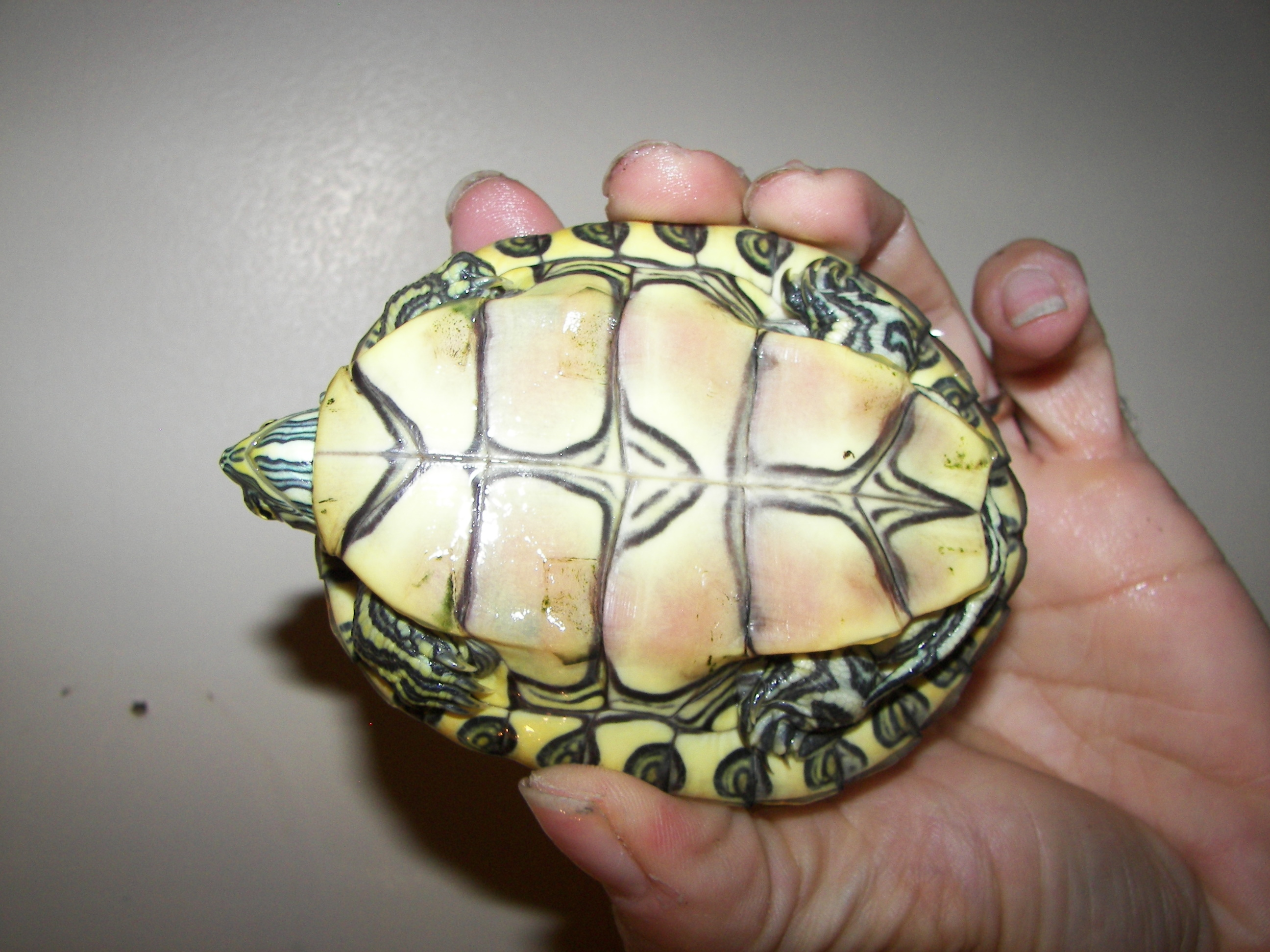 dessin representatif d'une emolli